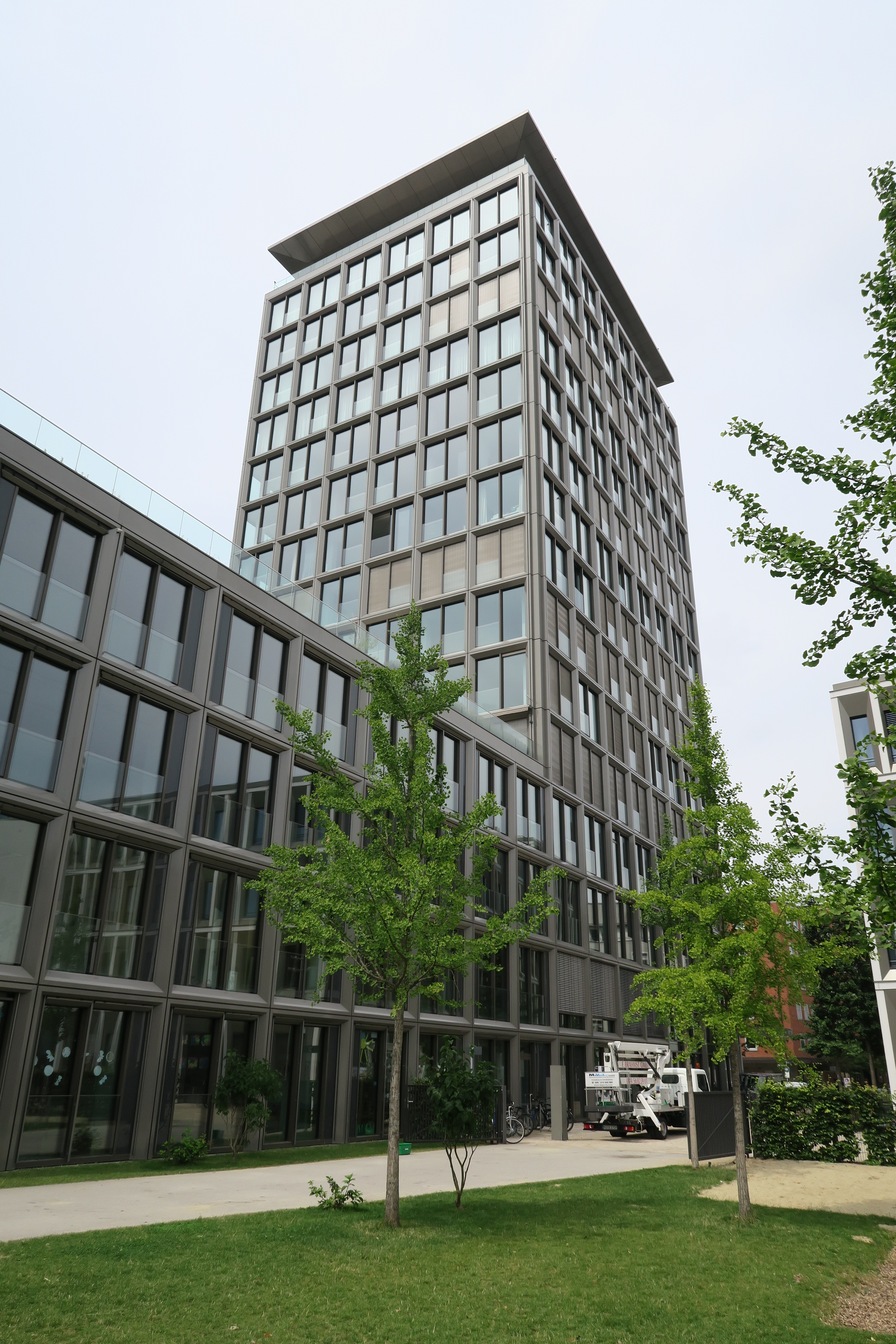 'The Seven' in der Müllerstraße 7 in München